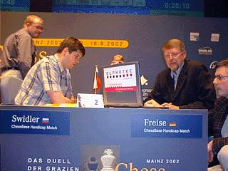 Peter Swidler und Eckhard Freise spielen auf der Bühne in der Rheingoldhalle Mainz, anläßlich der Chess Classic 2002.